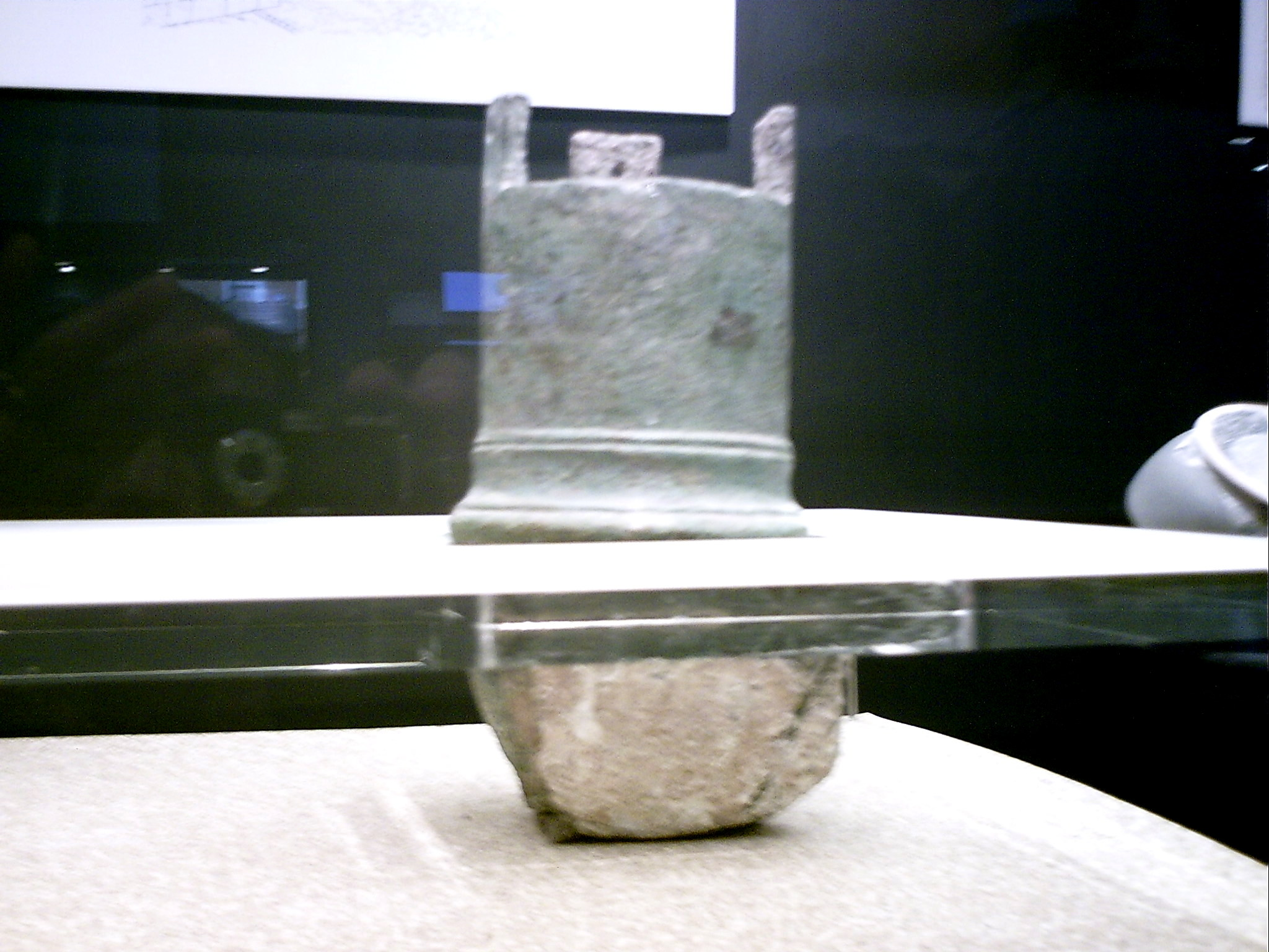 Polleguera de bronze d'una de les portes de la ciutat romana de Baetulo, que donava entrada pel SE des de la Via Augusta, trobada al clos de la Torre. Es conserva al Museu de Badalona, Badalona, Barcelonès, (Catalunya).